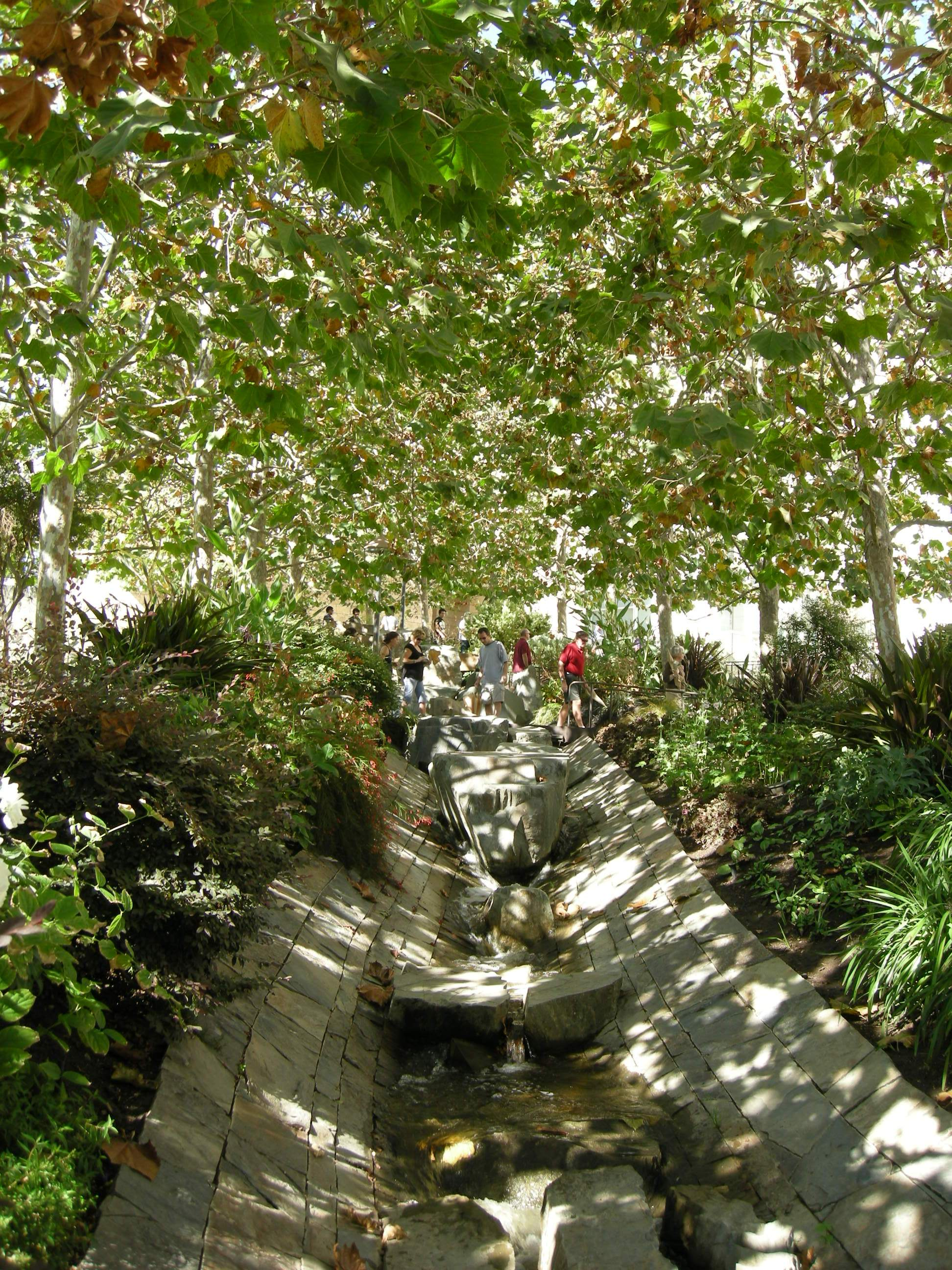 Getty Center - Gardens